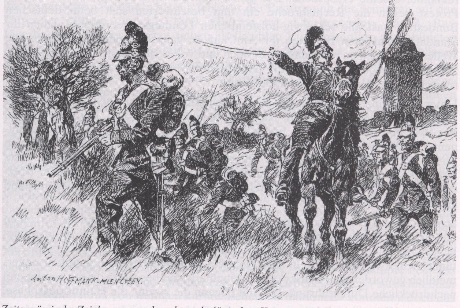 Bayern bei Düppel 13. April 1849